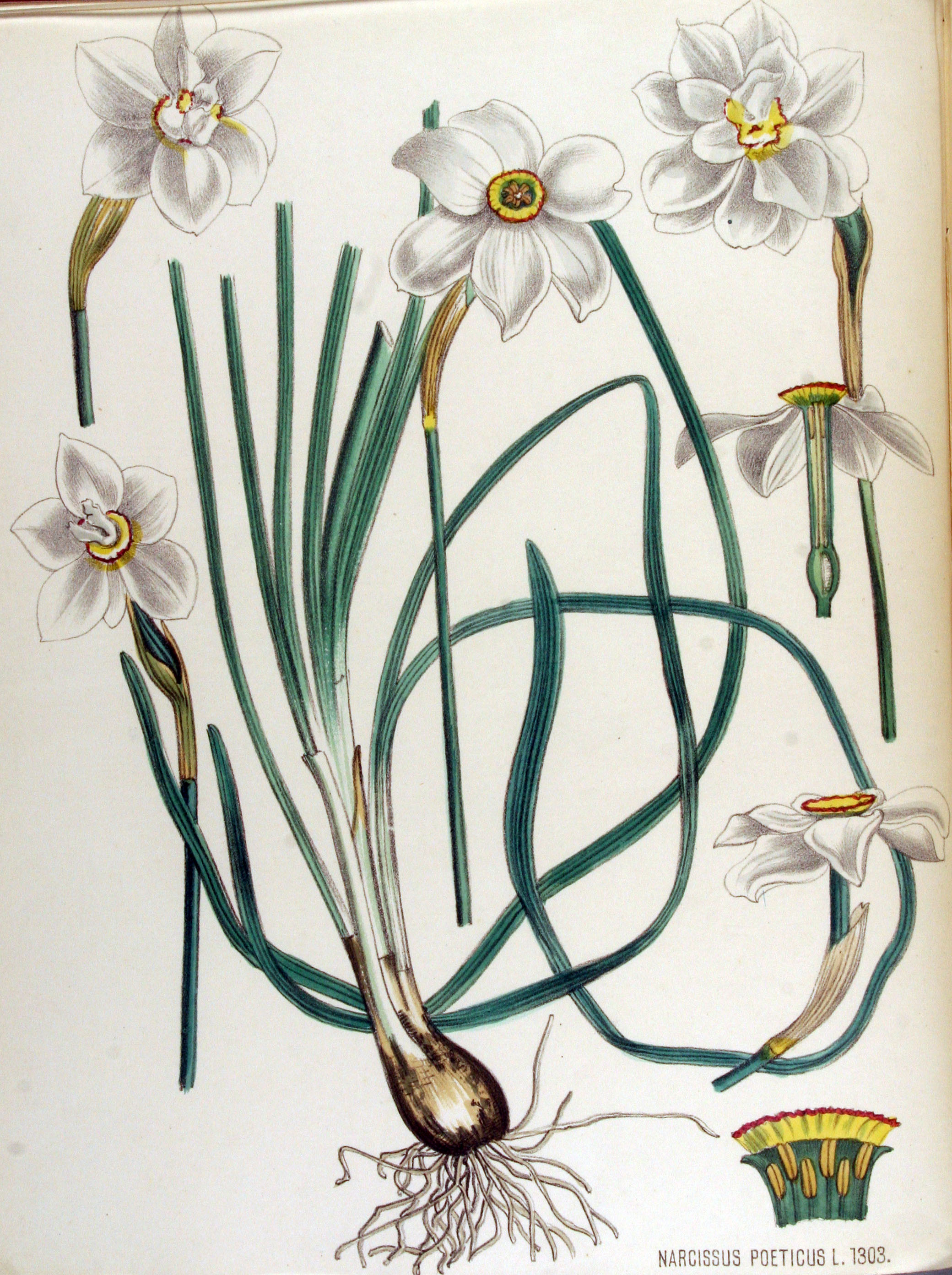 Narcissus poeticus L.